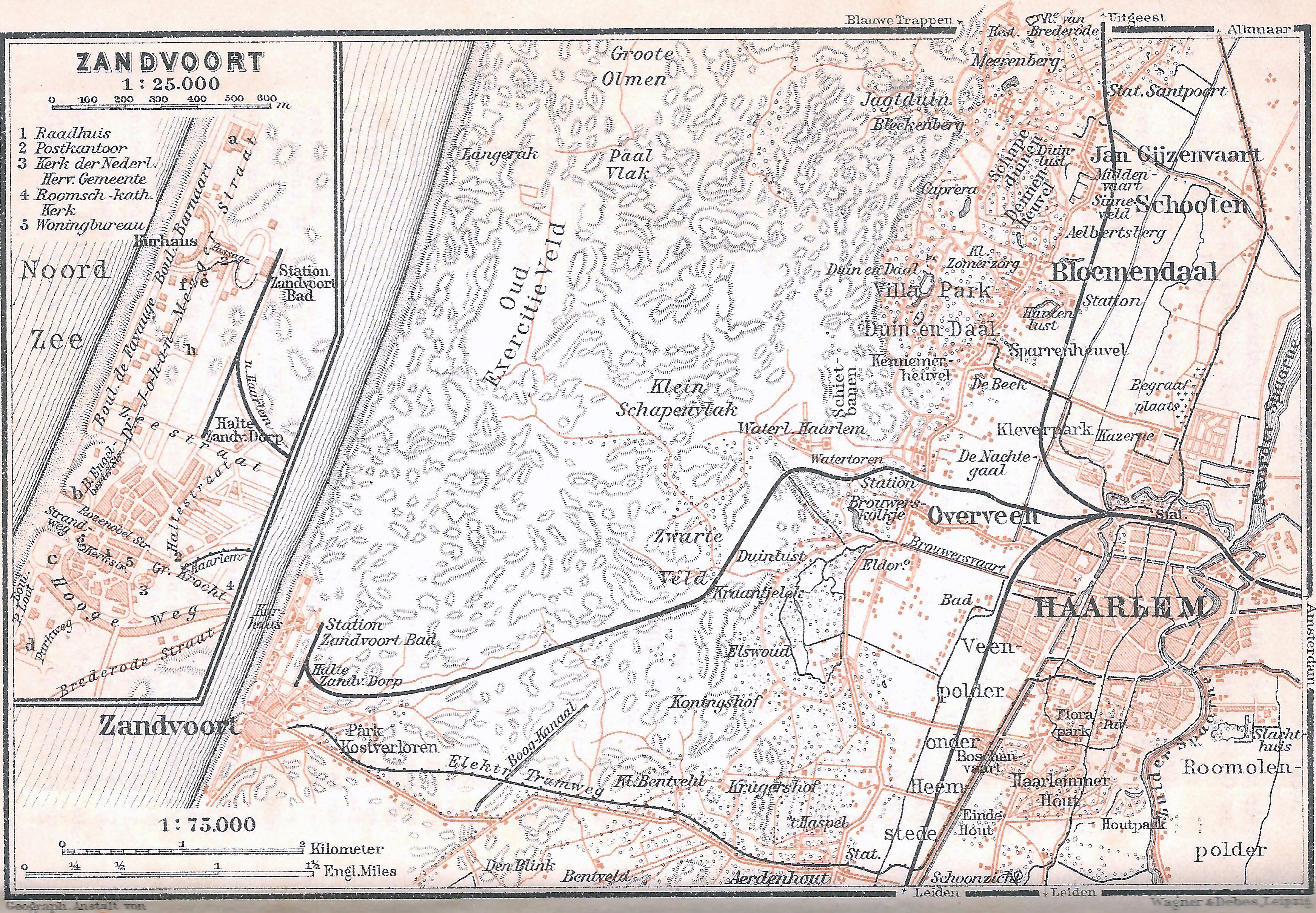 Kaart van Haarlem en Zandvoort uit de Baedeker reisgids van 1905. Na 1905 worden de spoorlijnen aangepast en komt de huidige kopstation. Er was ook een paardentram in Zandvoort.